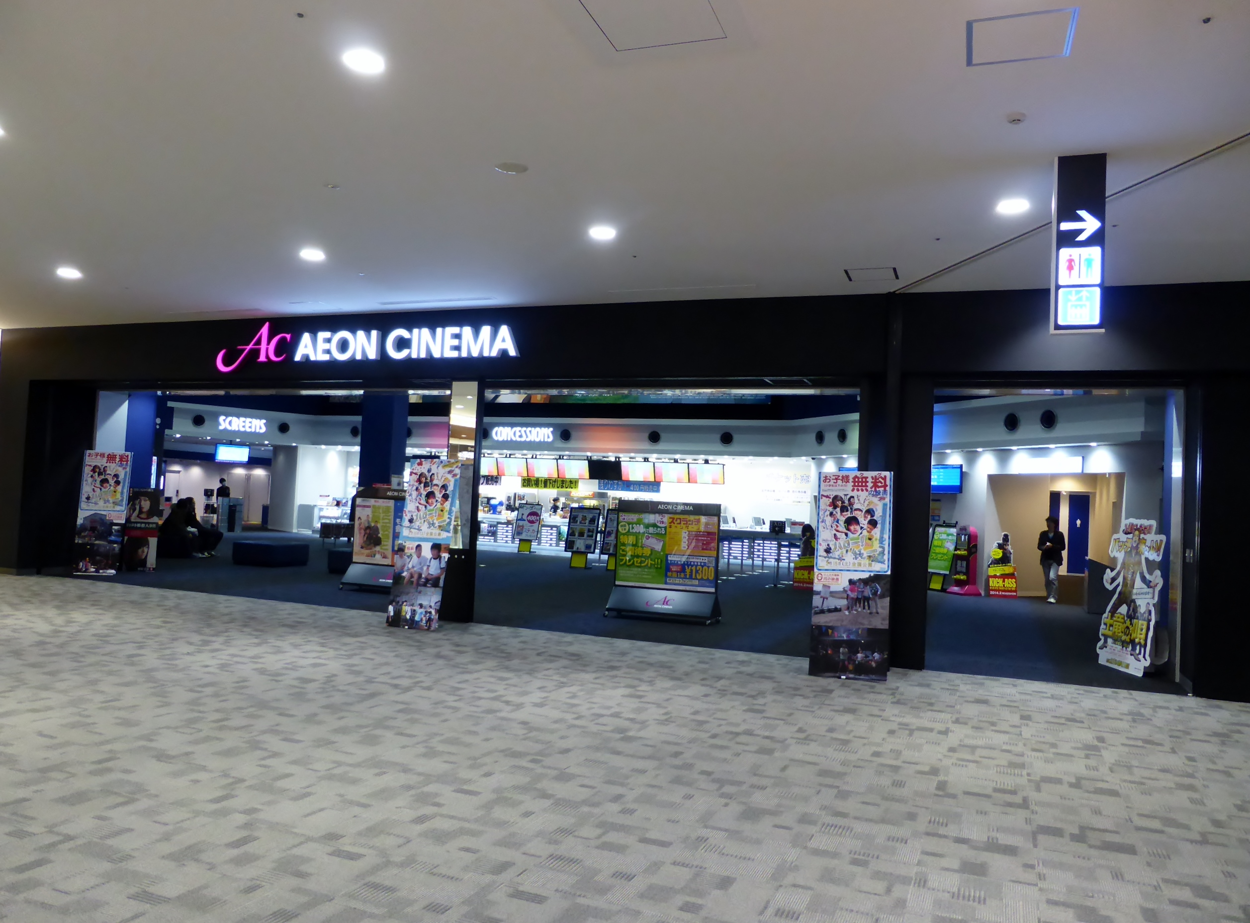 イオンシネマ東員を撮影。